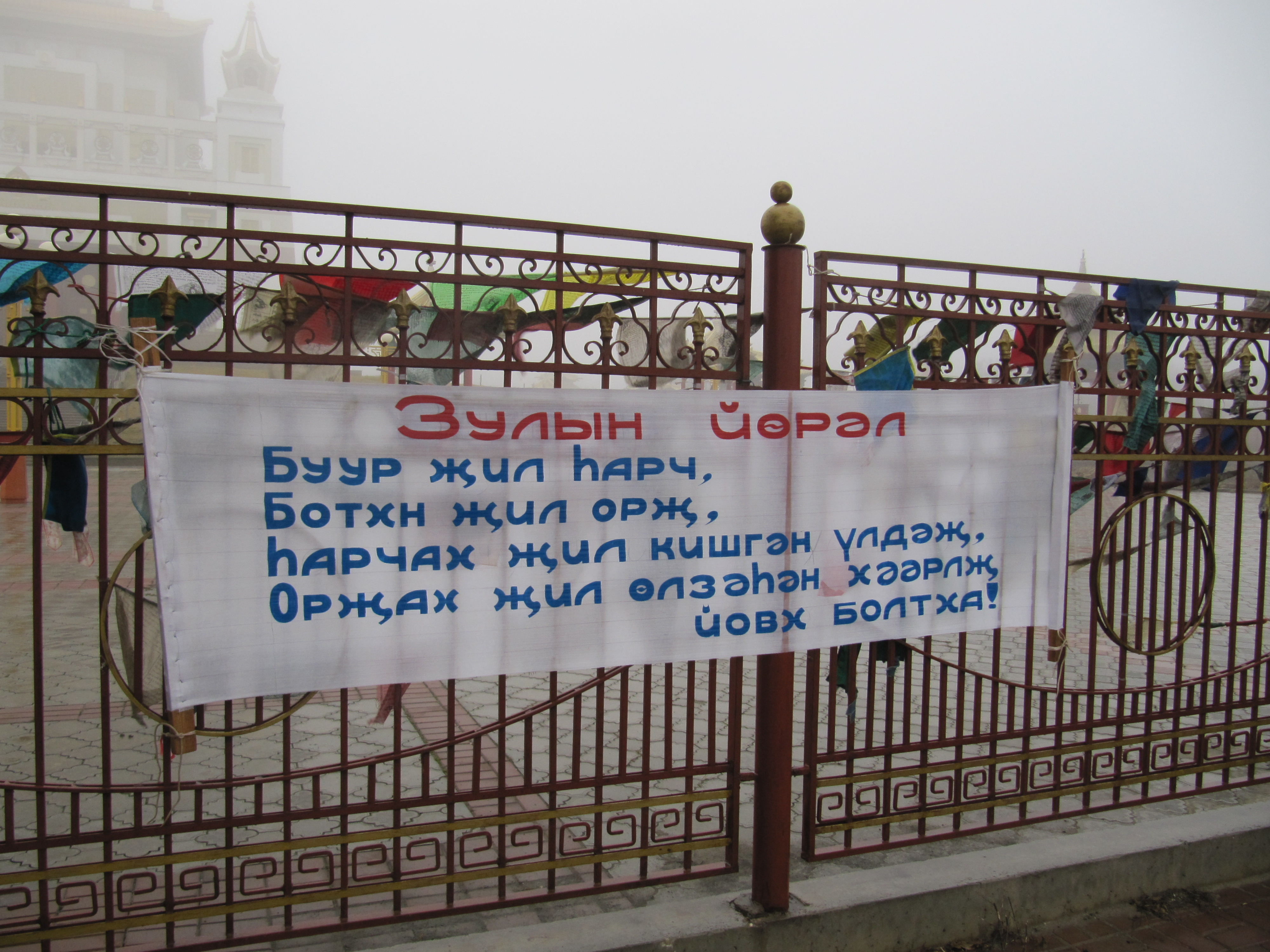 Йорял - калмыцкое благопожелание